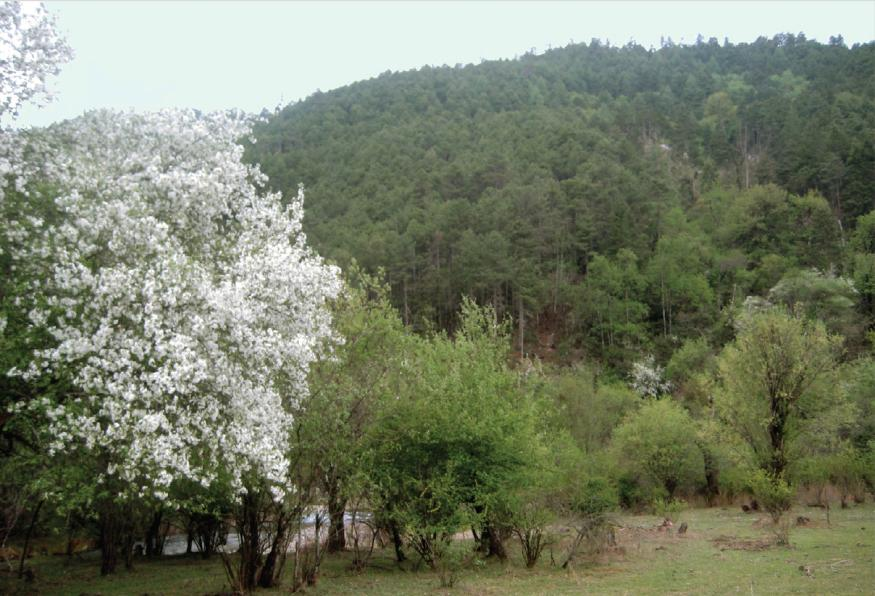 Stenoloba solaris habitat